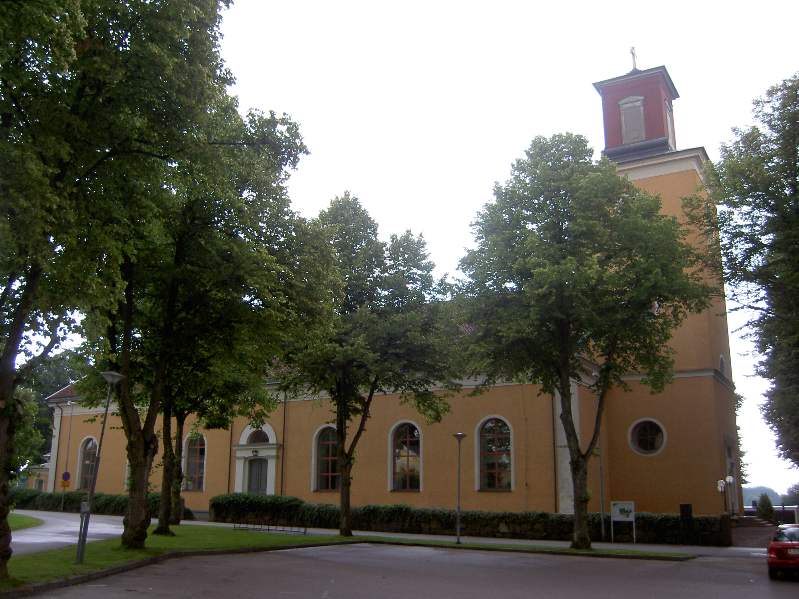 Ålems kyrka